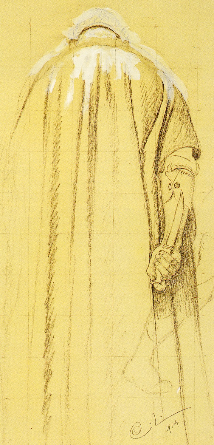 Carl Larsson, Midvinterblot, studie av bödeln, 1914, svartkrita 77,5 x 37 cm. deutsch: Carl Larsson, Midvinterblot, Studie des Priesters, Kreide auf Karton, 77,5 x 37 cm.